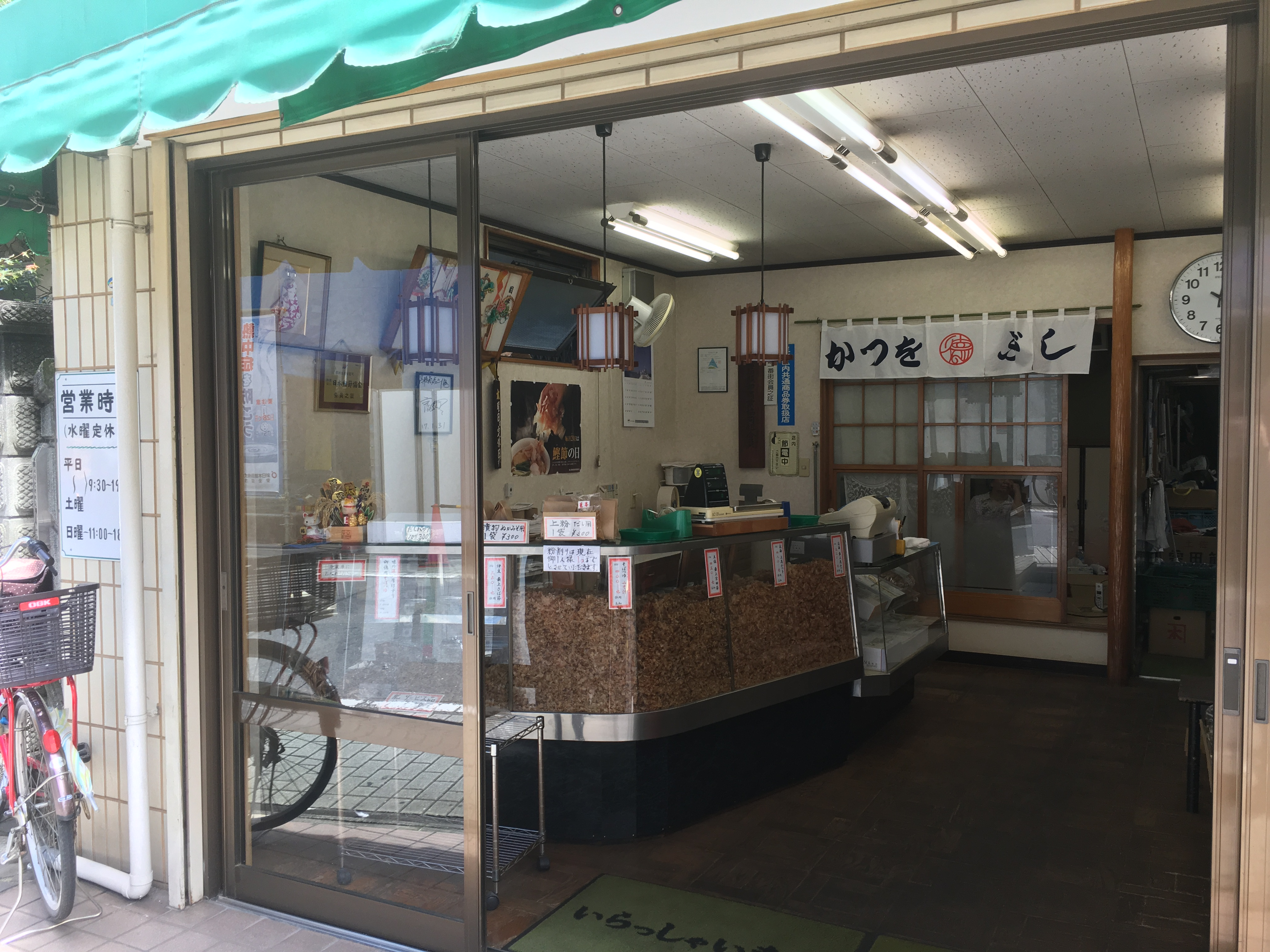 かつお節の販売店 (Shop selling Katsuobushi)